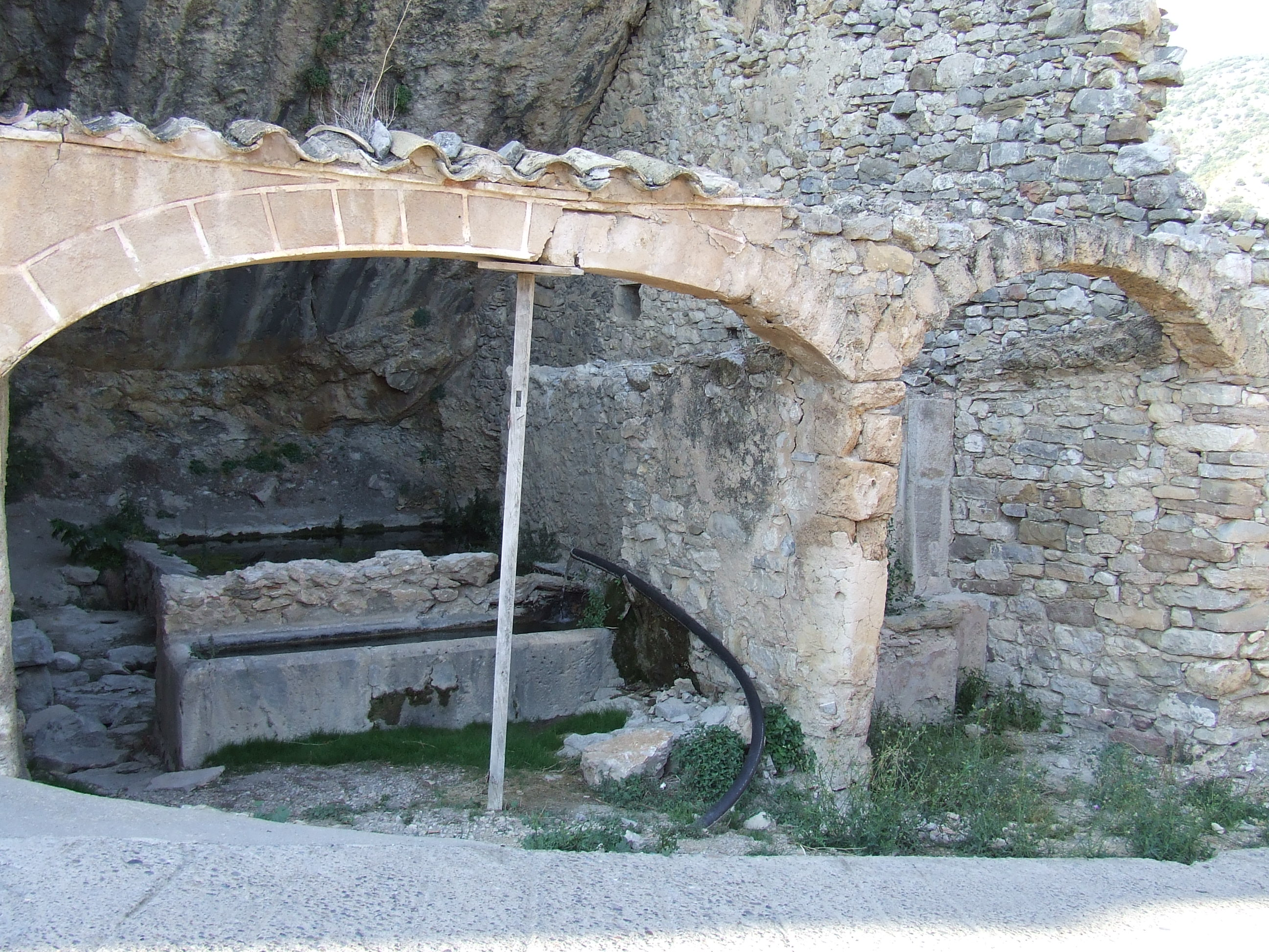 Safareigs públics de la vila d'Abella de la Conca, de mitjan segle XIX.